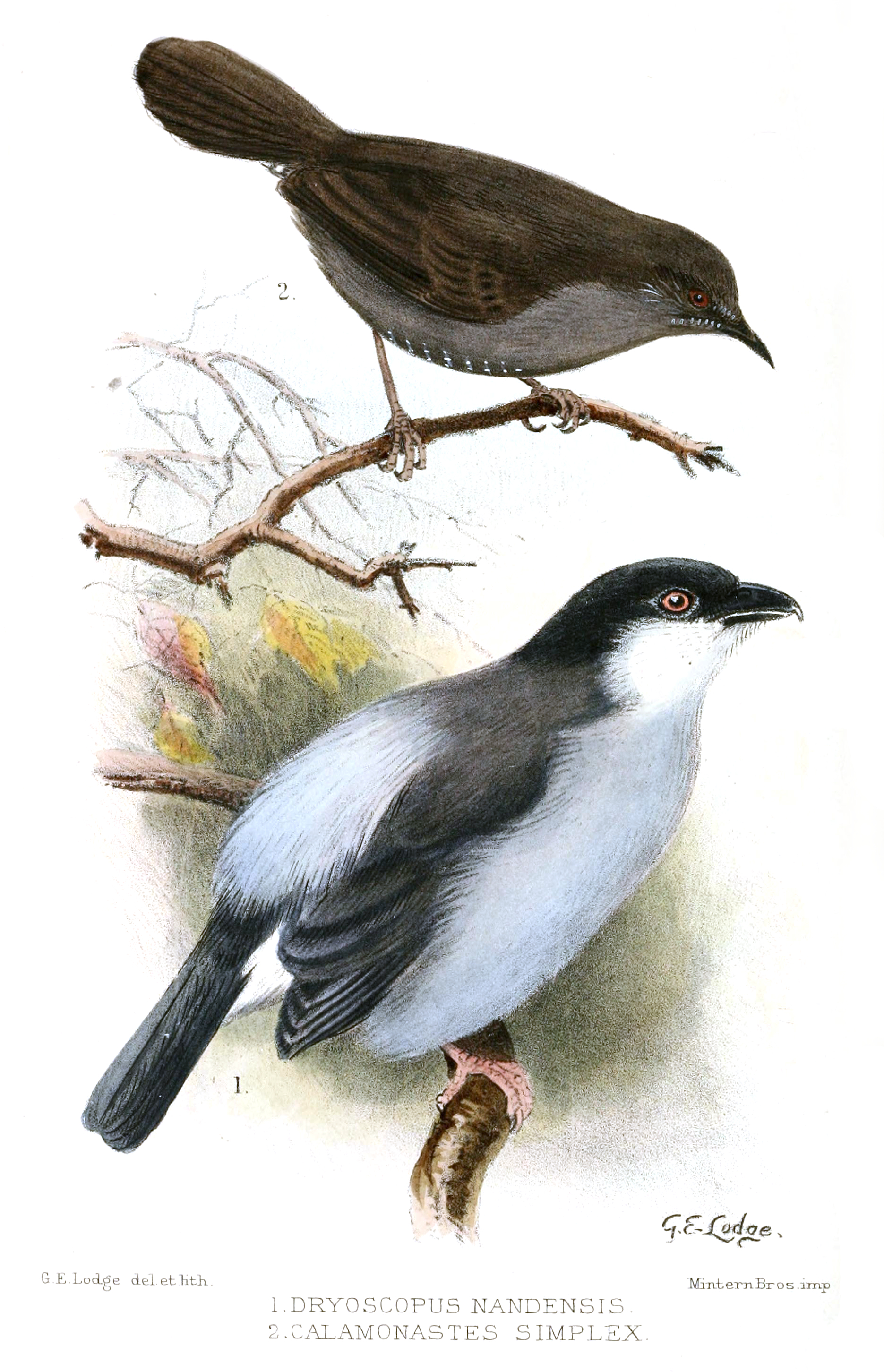 Dryoscopus nandensis =Dryoscopus angolensis & Calamonastes simplex=Camaroptera simplex